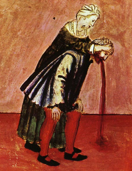 Vomiting man